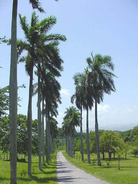 Avenida de la Palmas en el Jardín Botánico de Cienfuegos.